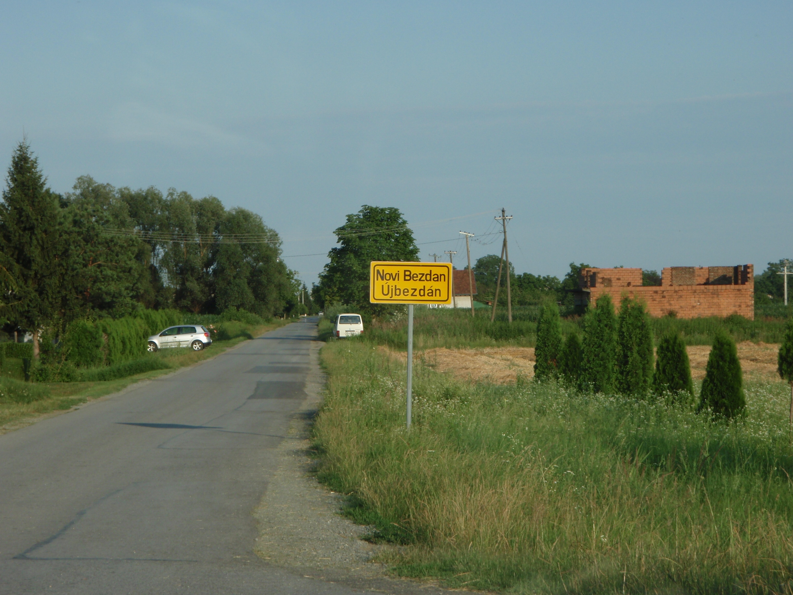 Novi Bezdan.